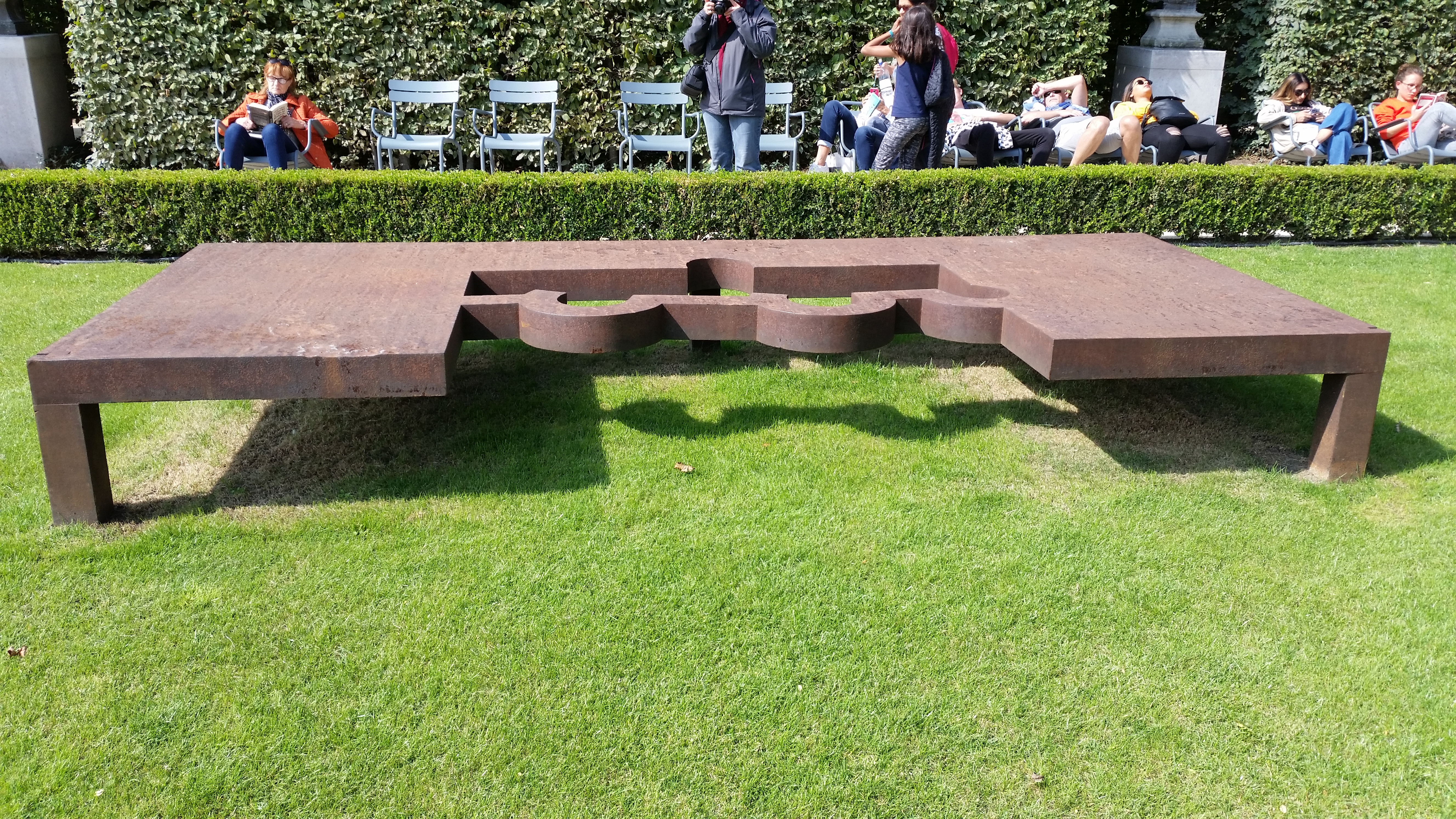 Tafel van Omar Khayyám, versie 3; in zomer 2018 te zien in de Rijksmuseumtuinen; normaliter in Museu d'Art Contemporani de Barcelona